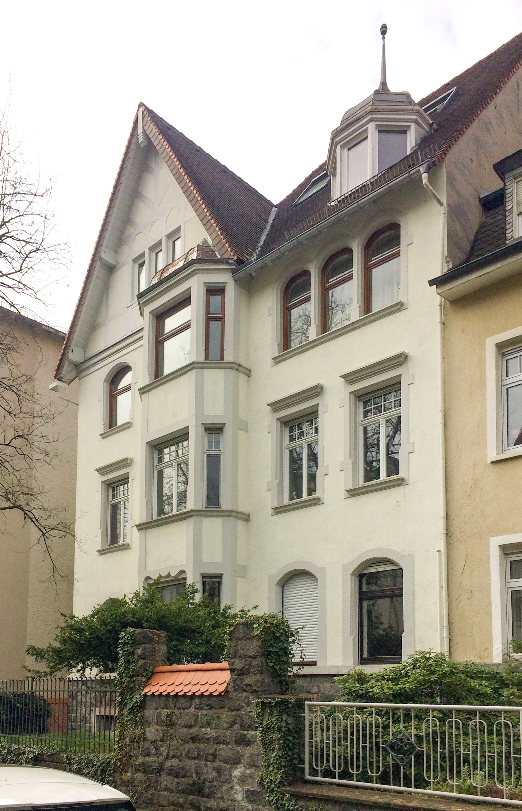 Liegenschaft Körnerstraße 16 in Offenbach am Main